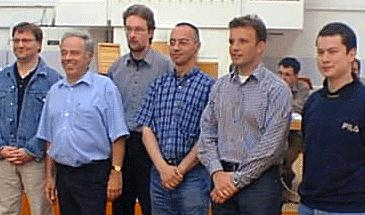 Siegermannschaft der Deutschen Blitzmannschaftsmeisterschaft im Schach, Juni 2002 in Solingen. Von rechts nach links: Die Solinger Joël Lautier, Jeroen Piket, Predrag Nikolić, Markus Schäfer, MF und Bernd Schneider.